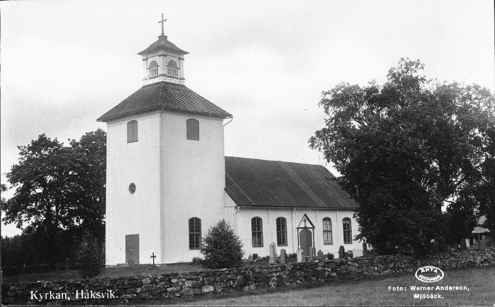 Kyrkan från sydväst. Vykort. Kategori: (01) ExteriörerKyrkan från sydväst. Vykort.